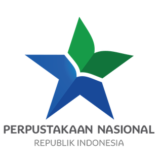 Logo Perpustakaan Nasional Republik Indonesia